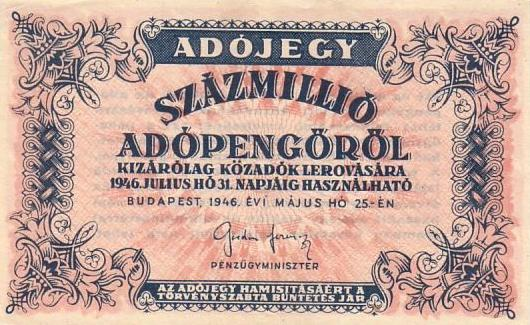 100 000 000 adópengő tax bill (1946) - obverse